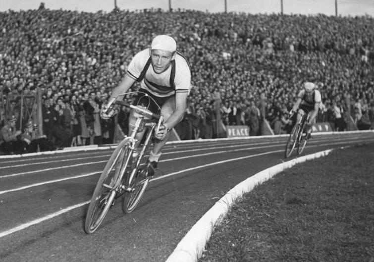 VIII. Friedensfahrt, Joseph Verhelst Zentralbild CAF-V Bey-Ho 18.5.1955 - VIII. Internationale Radfernfahrt Prag-Berlin-Warschau. UBz: Die letzten Meter der VIII. Internationalen Friedensfahrt werden im Warschauer-Stadion zurückgelegt. Mit klarem Vorsprung biegt der Belgier Verhalst vor seinem Landsmann van Loeveren in die Zielgrade ein. Er sicherte sich den letzten Etappensieg des längsten Amateurstrassenrennens der Welt.